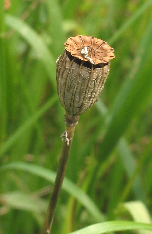 Grote klaproos vrucht (Papaver rhoeas)